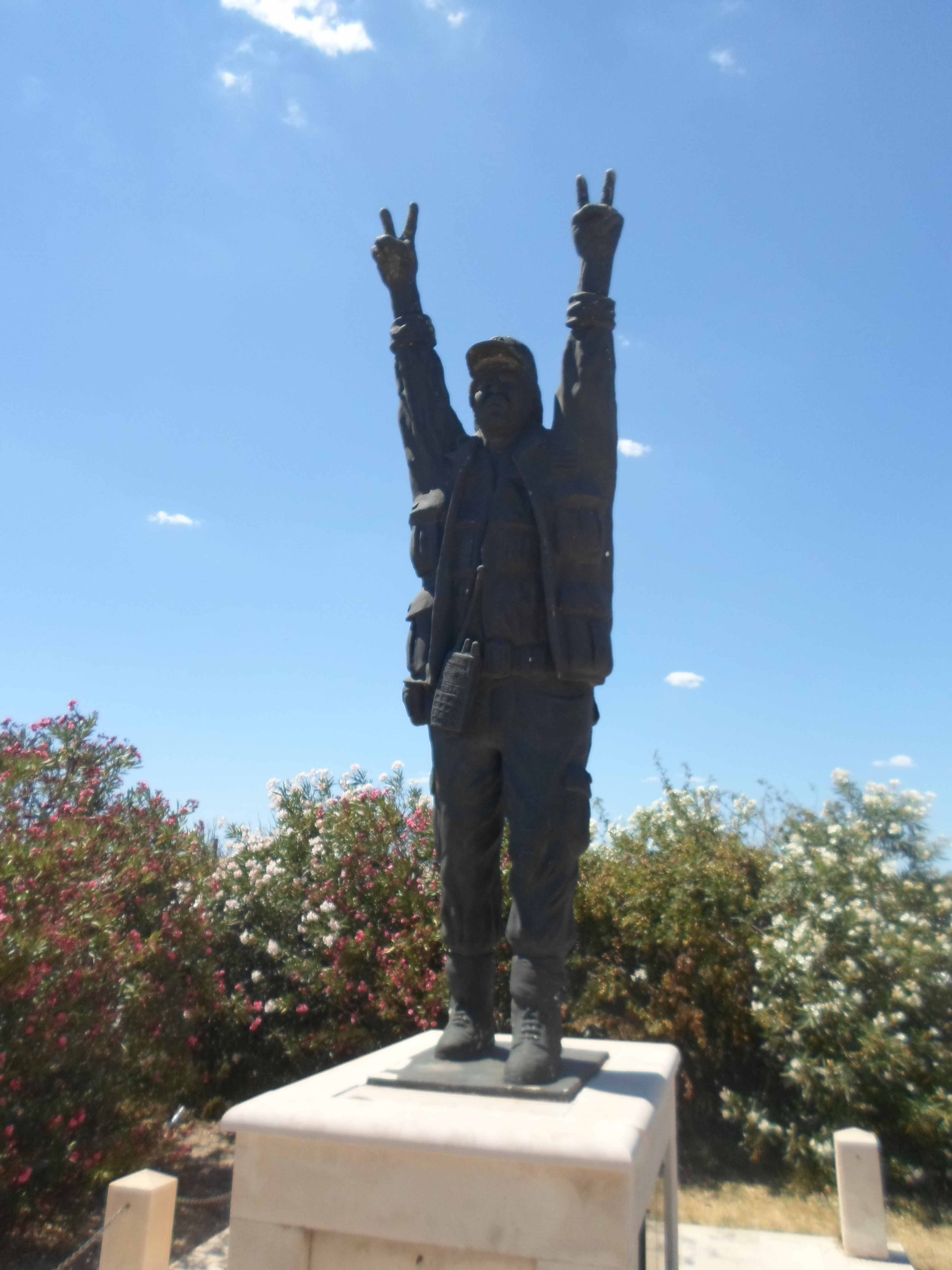 spomenika Anti Juričev Martinčev - Bobanu koji je gotovo sam zaustavio prodor tenkova JNA u Vodice '91.